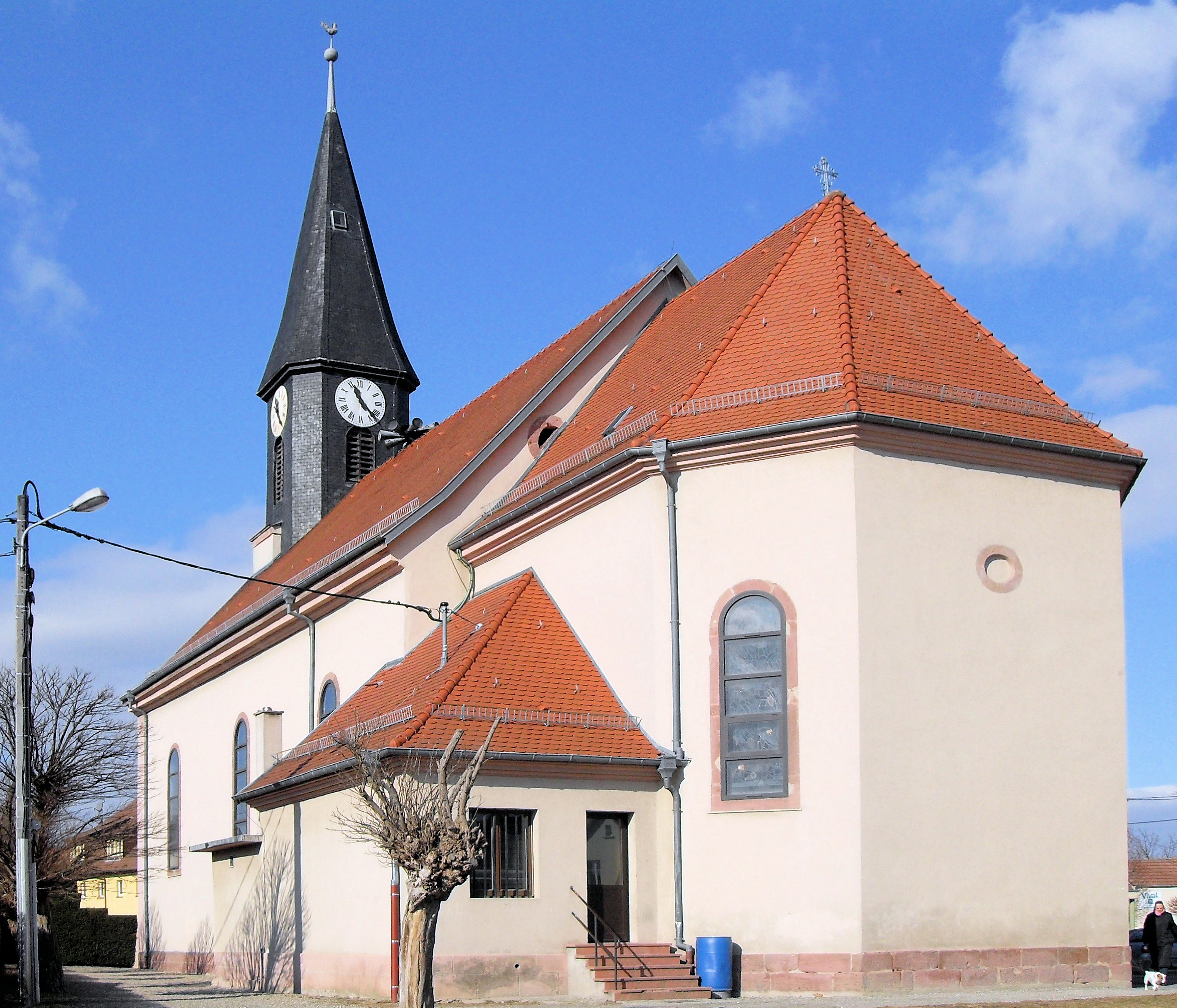 L'église Saint-Pierre et Saint-Paul à Baldersheim